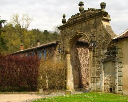 FRANCE - 57640 VIGY - Abbaye cistercienne de Villers Bettnach